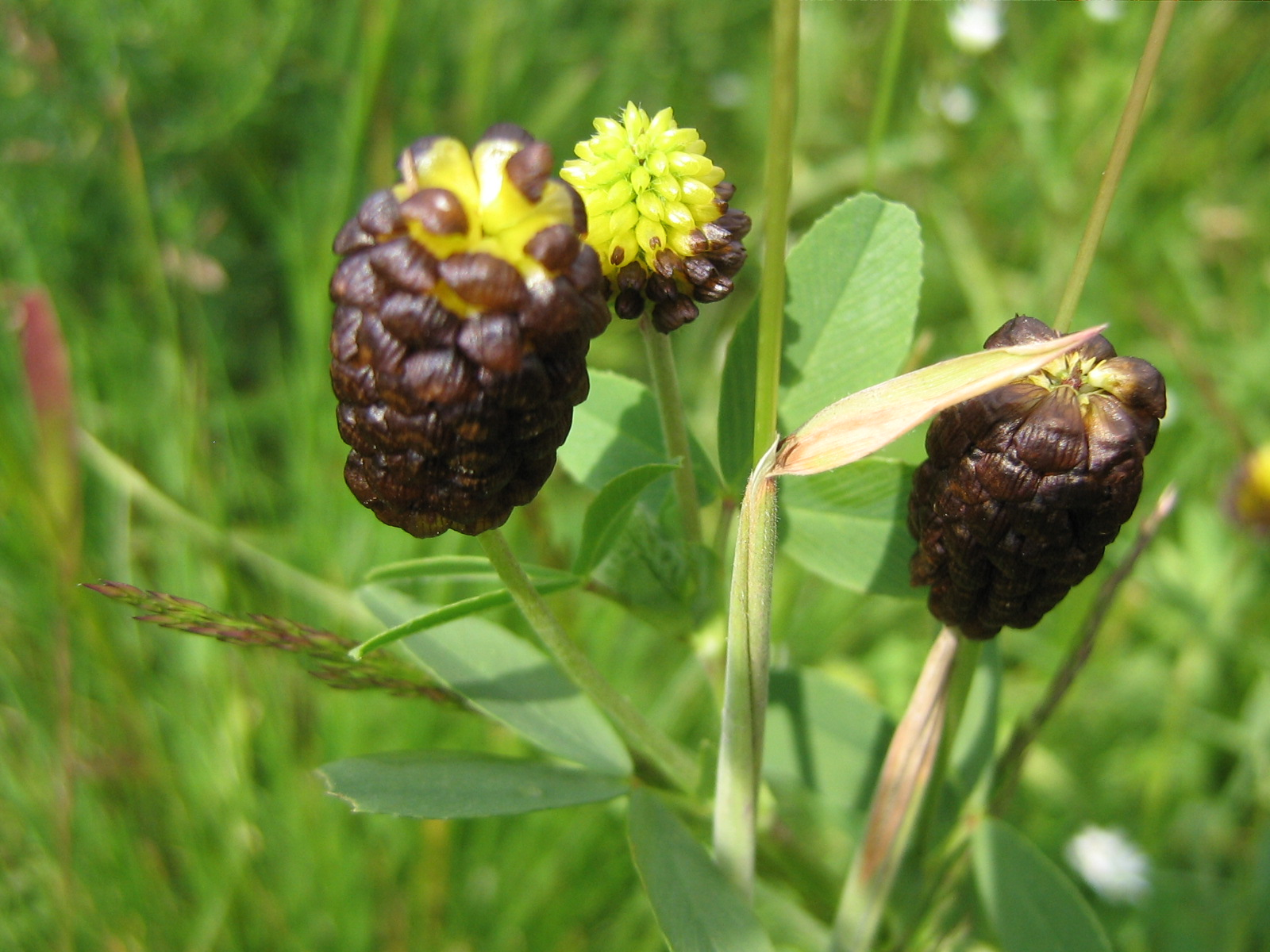 Trèfle brun dans les pelouses de l'Aubrac (Massif central - France)